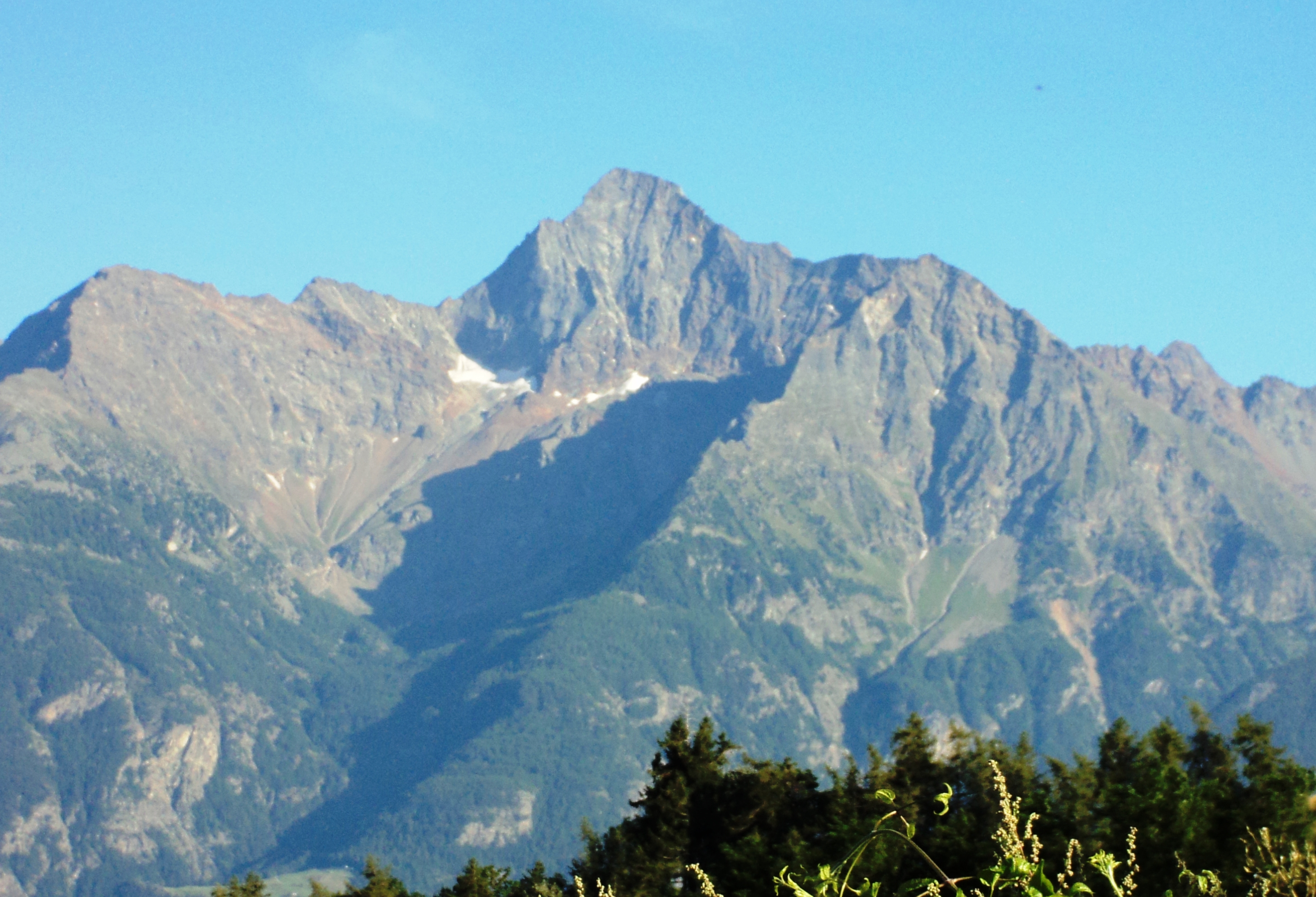 Il Monte Emilius visto salendo al passo del Gran San Bernardo